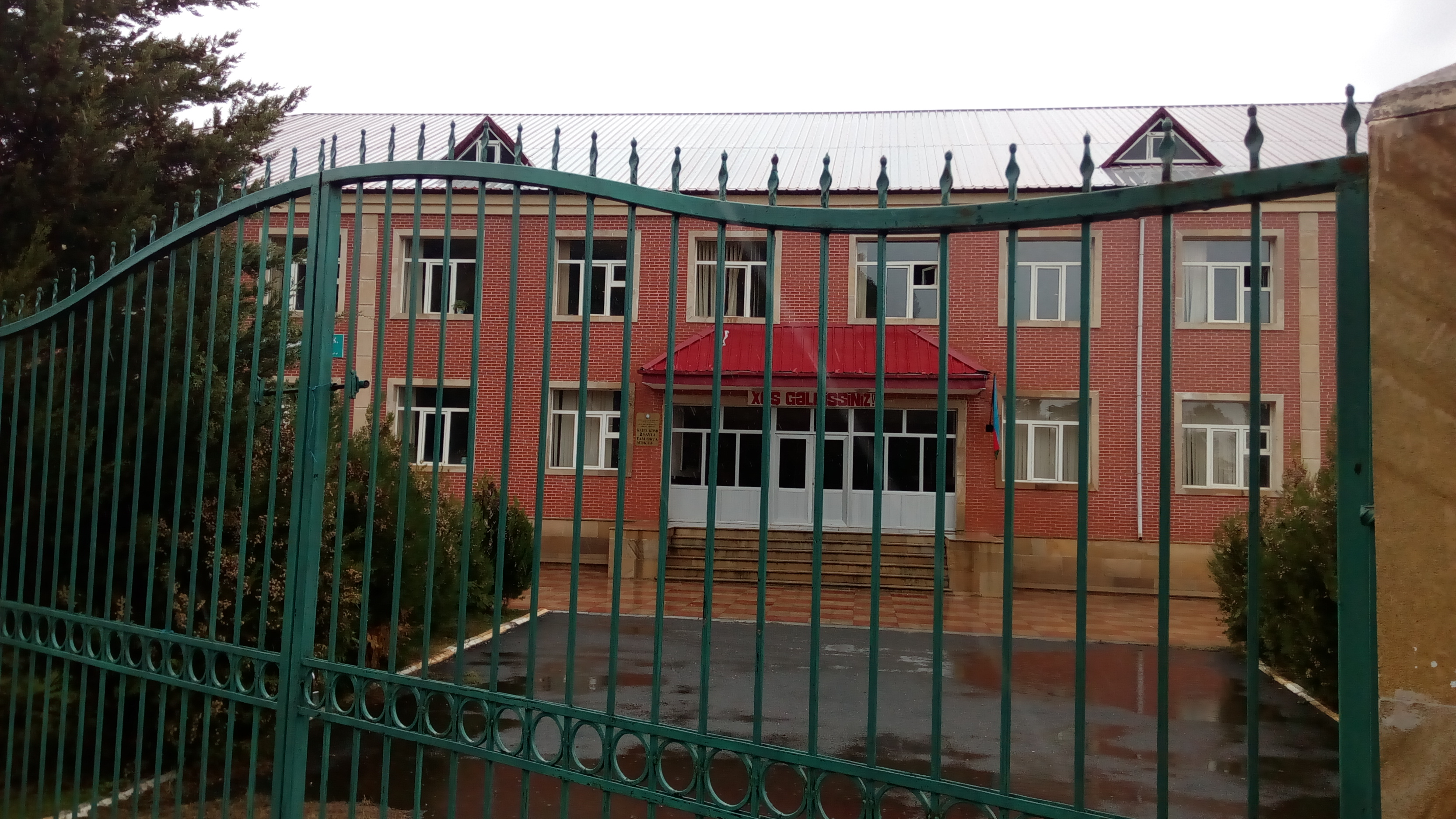 Balakən